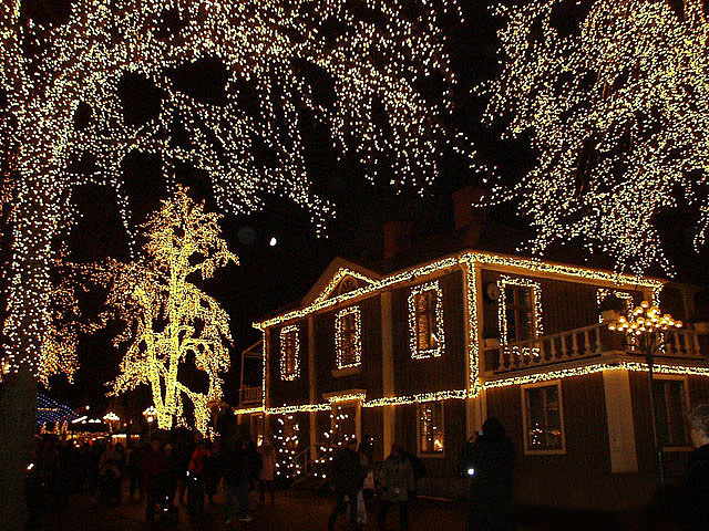 Una partecita del parque de diverciones de Gotemburgo el cual llegando las fiestas de fin de año vuelve a abrir todo decorado para las fiestas y con algo mas que 4.000.000 de lamparitas adornando todo.